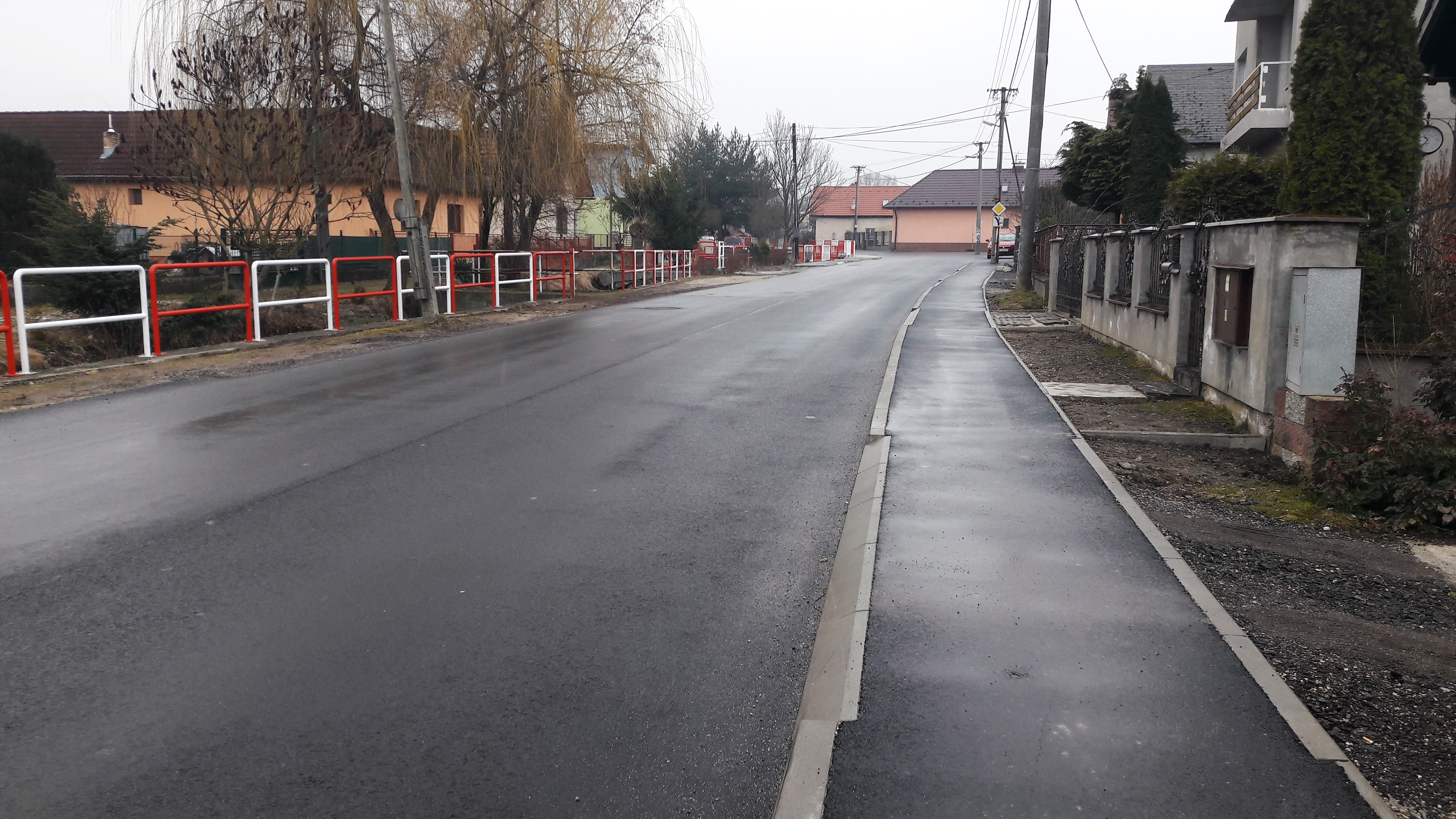 Zrekonštruovaná cesta a chodník